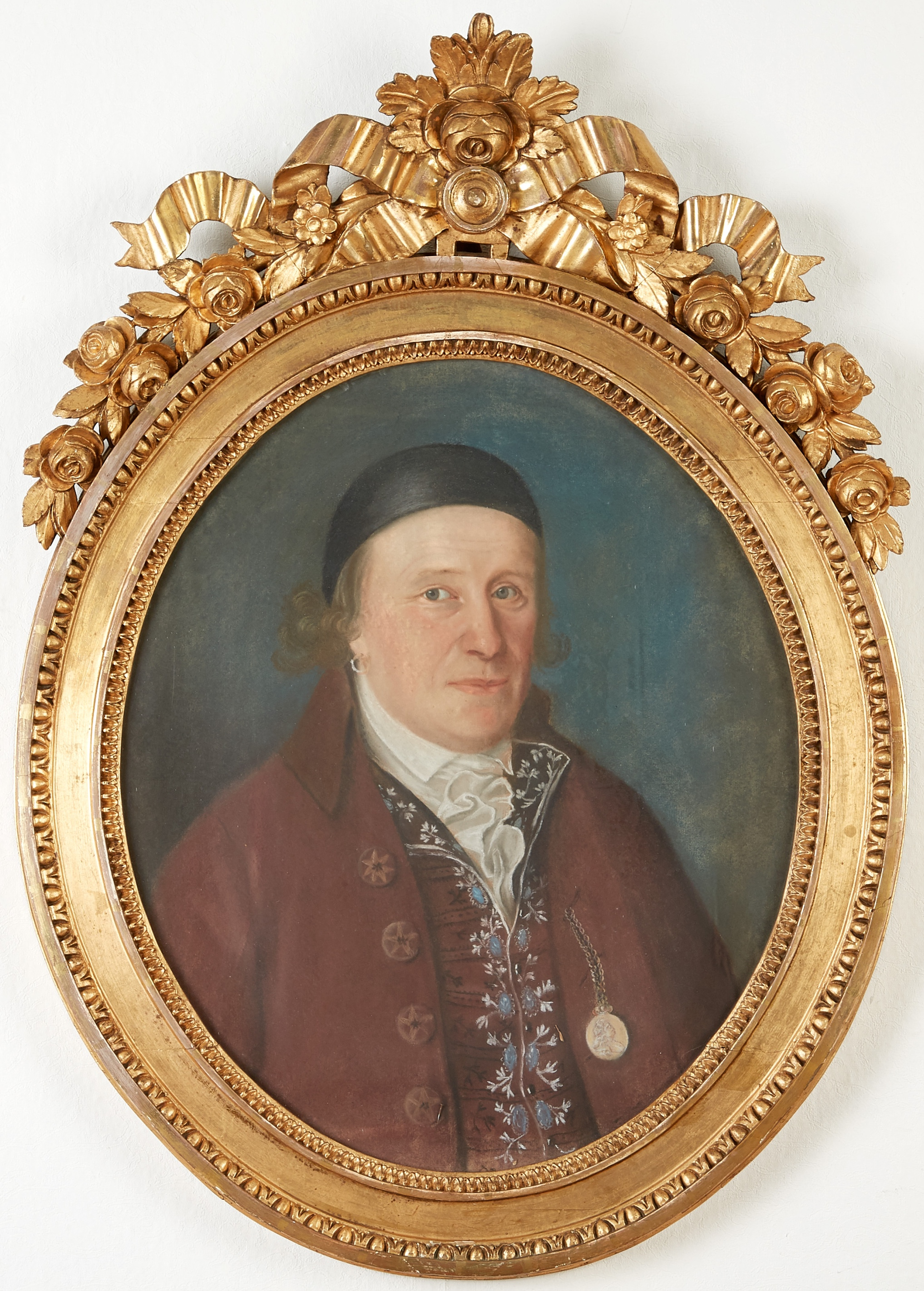 Johan Melchior Lundberg d.ä. (1745-1812) stolmakarmästare i Stockholm. Iklädd rock och broderas väst. På bröstet syns Serafimermedaljen. Avporträtterad ca 1790 av okänd konstnär.